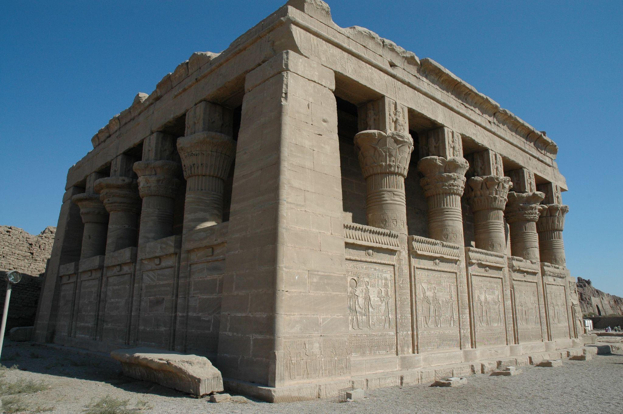 Dendara: mammisi romano